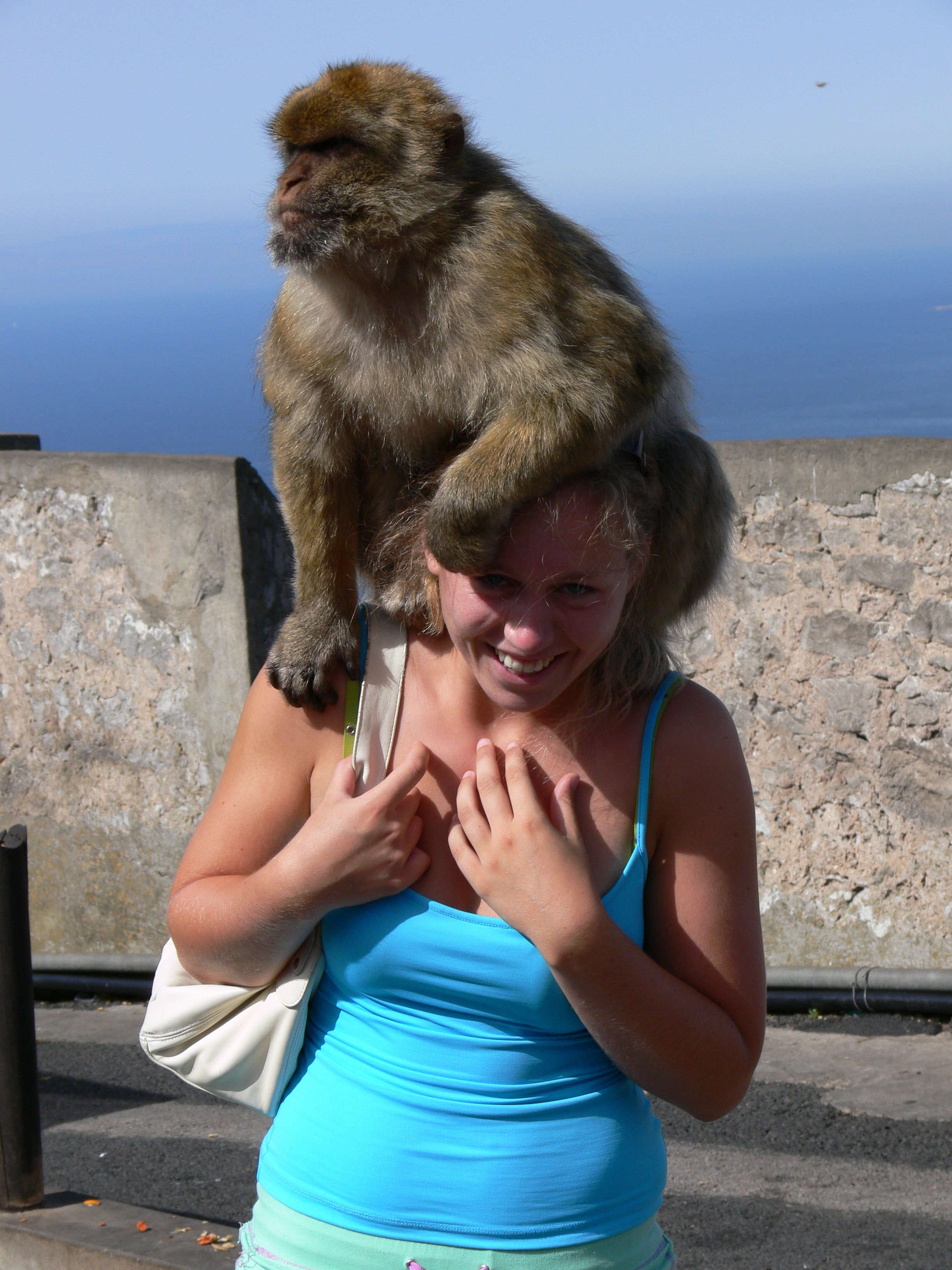 Aap op het hoofd van Laura